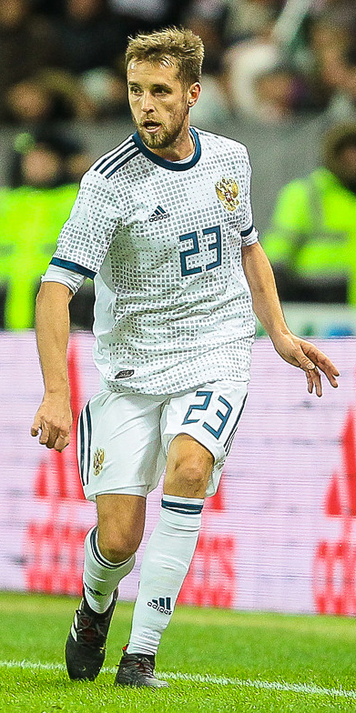 Россия проиграла Бразилии со счетом 0:3